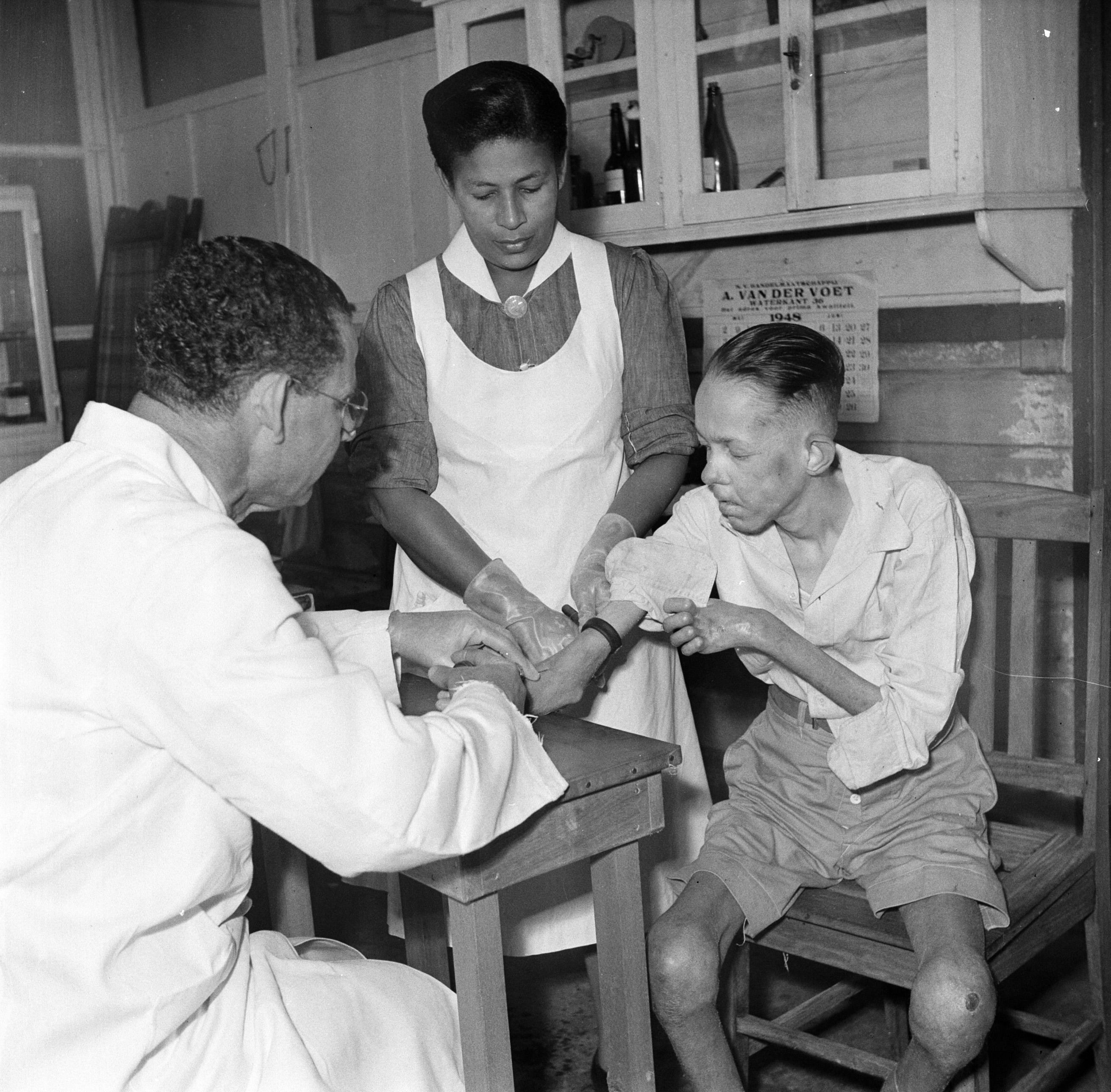 Collectie / Archief : Fotocollectie Van de Poll Reportage / Serie : Reis naar Suriname en de Nederlandse Antillen Beschrijving : Een dokter onderzoekt een patient in Leprozerie Bethesda van de Protestantse Vereniging tot Verpleging van Lepralijders in Suriname Datum : 1947 Locatie : Suriname Trefwoorden : artsen, lepra, verpleegkundigen, ziekenhuizen Fotograaf : Poll, Willem van de, [onbekend] Auteursrechthebbende : Nationaal Archief Materiaalsoort : Negatief (zwart/wit) Nummer archiefinventaris : bekijk toegang 2.24.14.02 Bestanddeelnummer : 252-6248